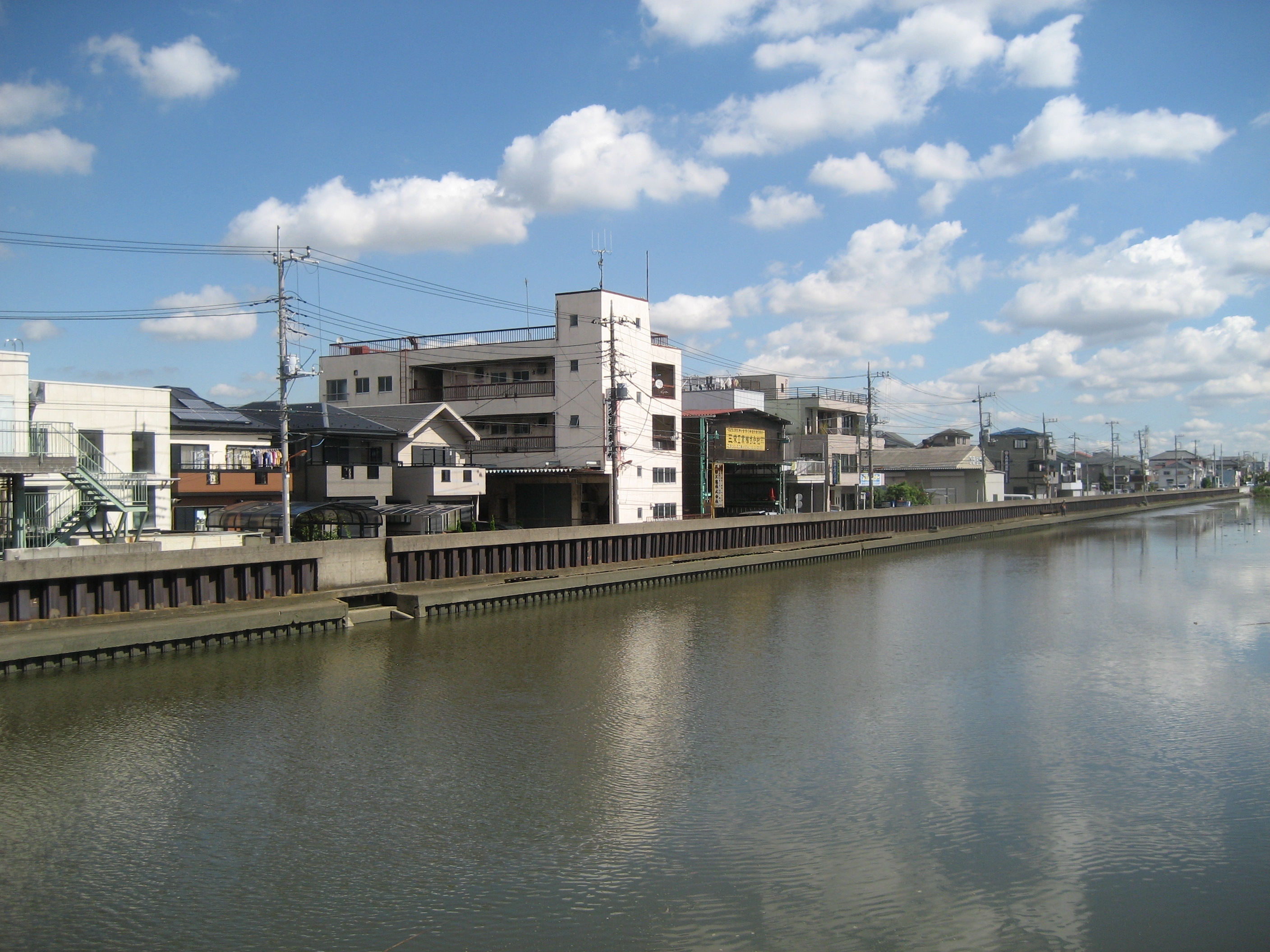 足立区六木地区（花畑運河から撮影）